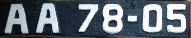 Передний автомобильный номер СССР образца 1936 года